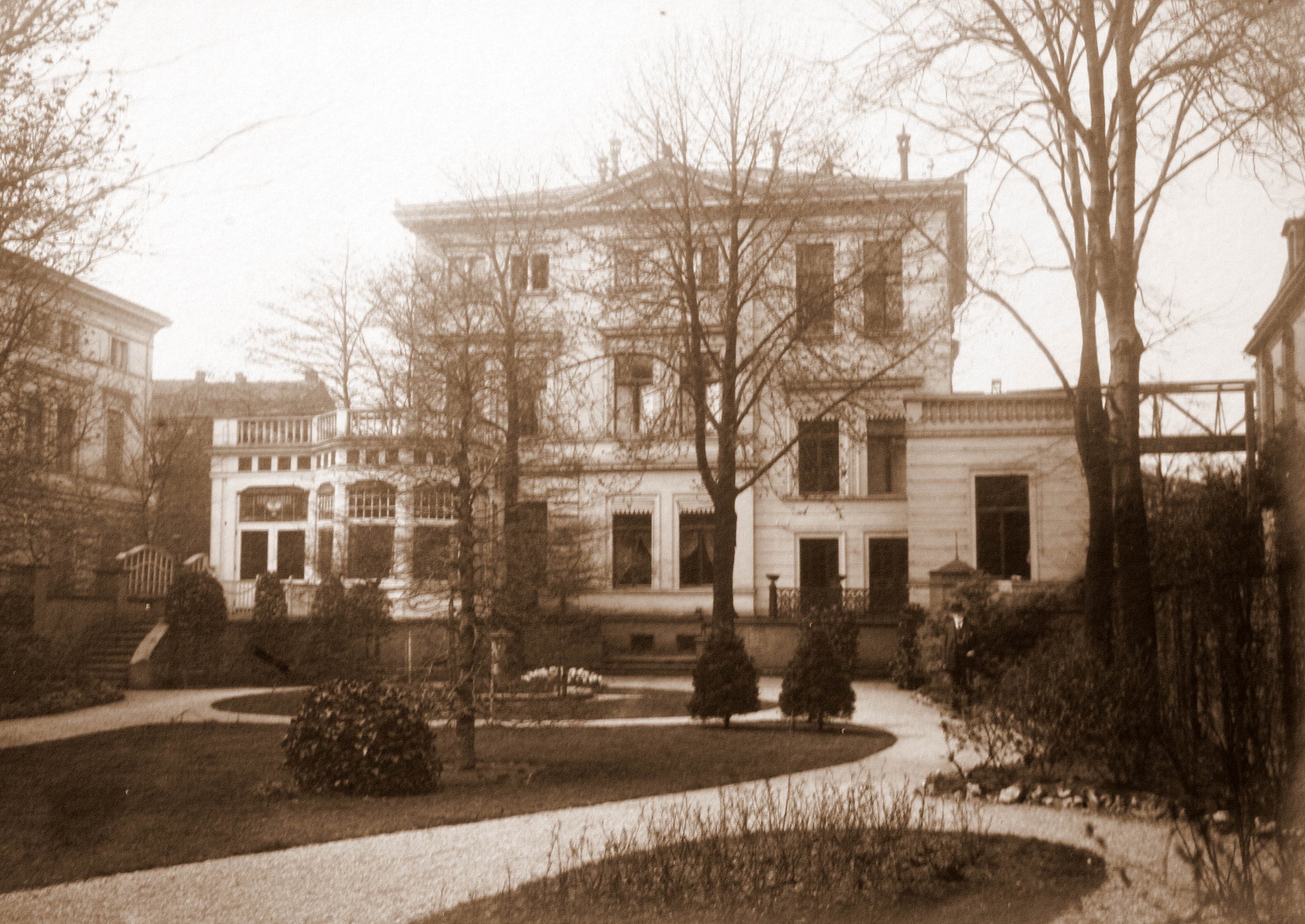 Gartenseite des Wohnhauses, Uferstraße 16 in Barmen-Wupperfeld, von Julius Erbslöh II., Fabrikant, Mäzen in Barmen, Landtagsabgeordneter (1842-1929)